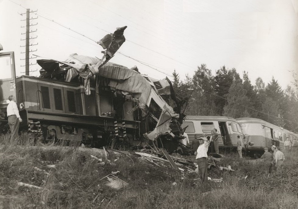 FRMJ Grycksbo olyckan KDAE13539. Retouched version of FRMJ Grycksbo olyckan KDAE13539.jpg